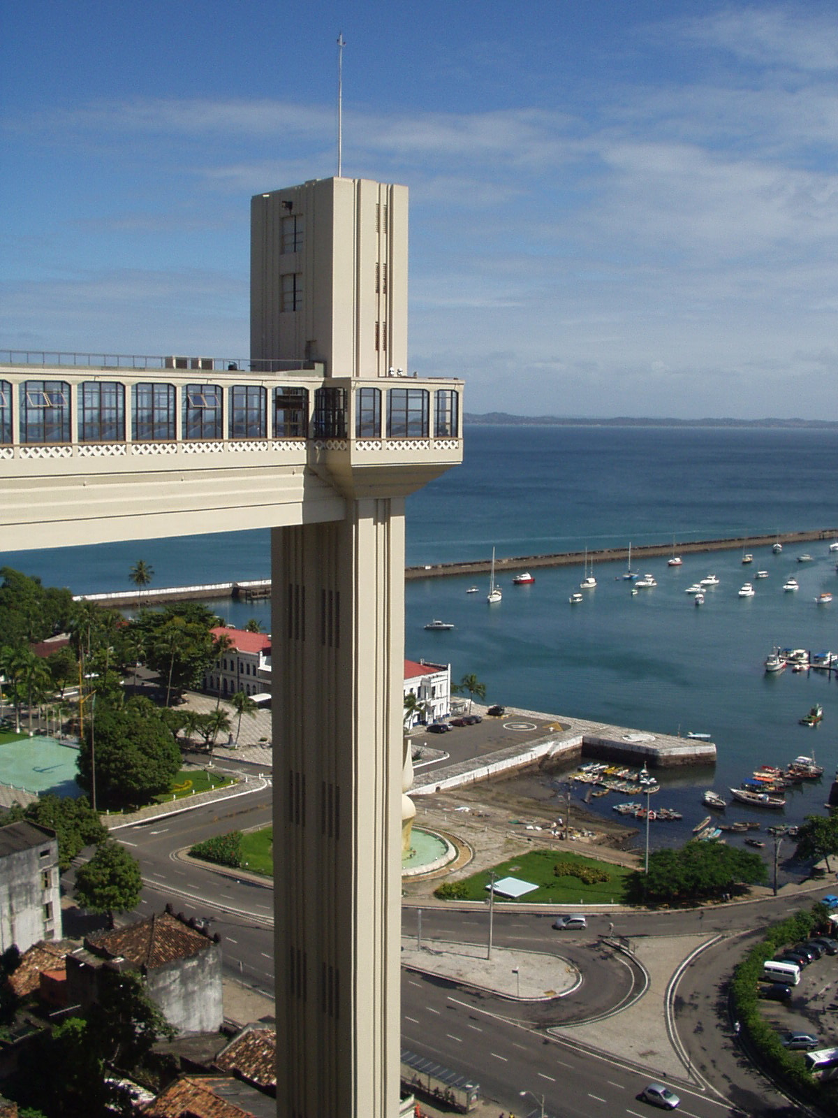 L'ascenceur de Salvador, qui relie la ville haute (le Pelourinho) à la ville basse. En arrière-plan, la baie de tous les saints. Auteur: Julien Vandeburie